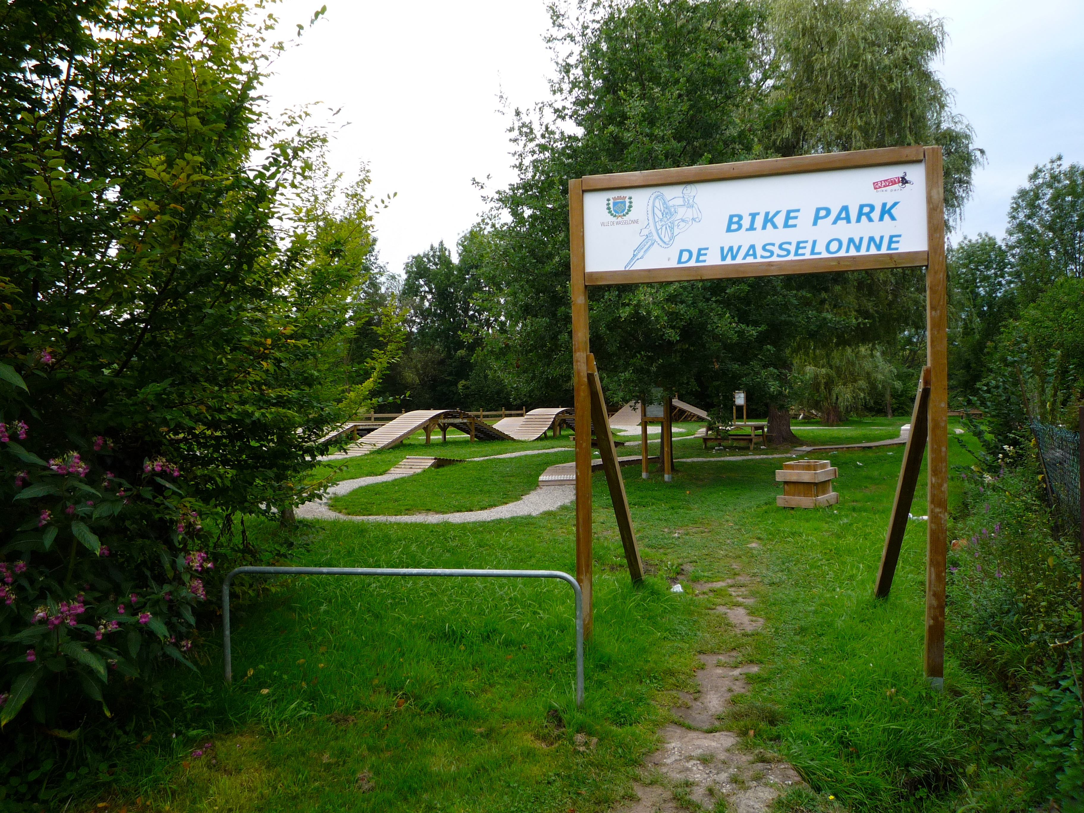 Wasselonne, le Bike Park en 2011.